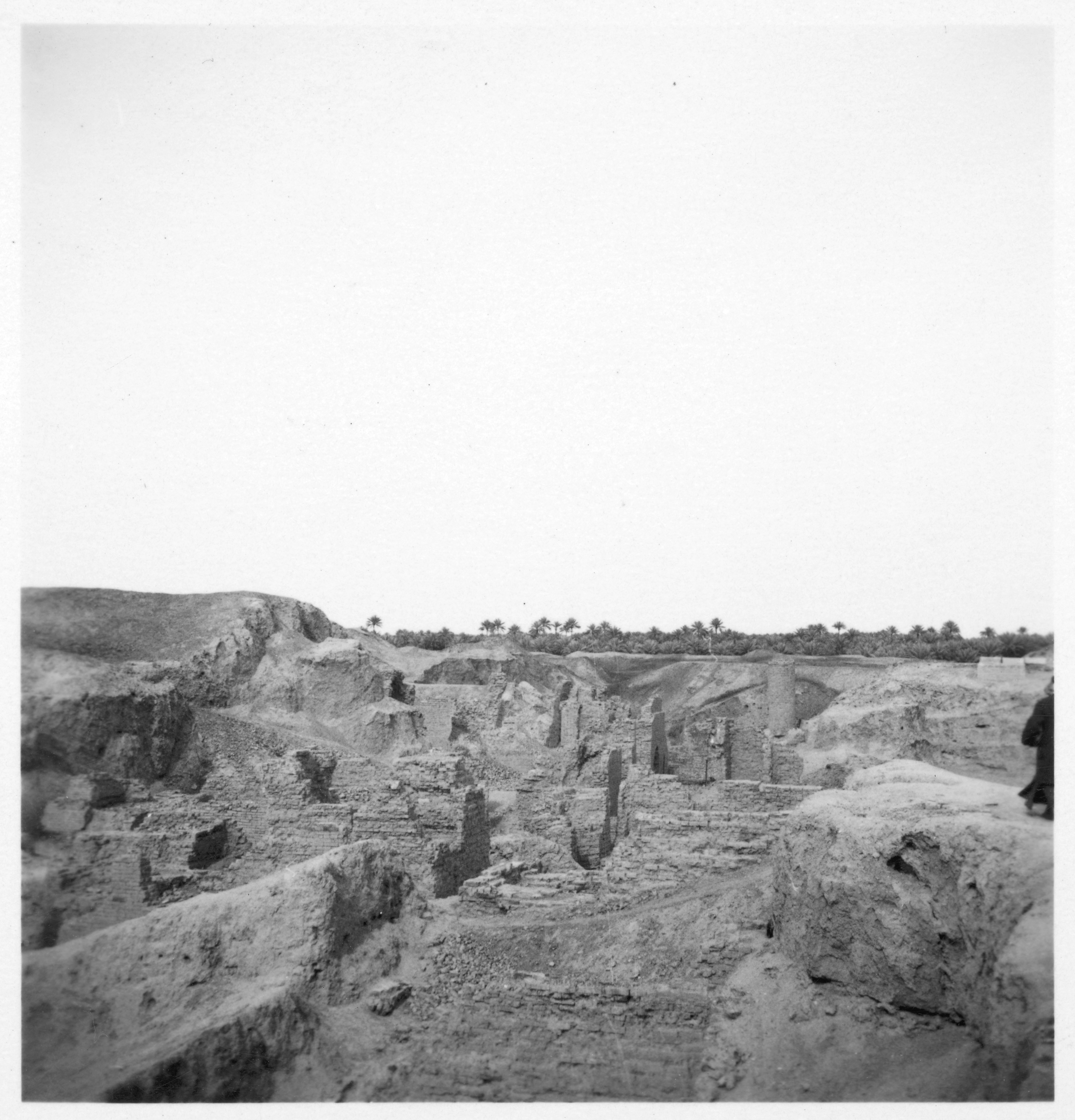 Irak, Babylon: Ruinen; Ansicht Ruinen